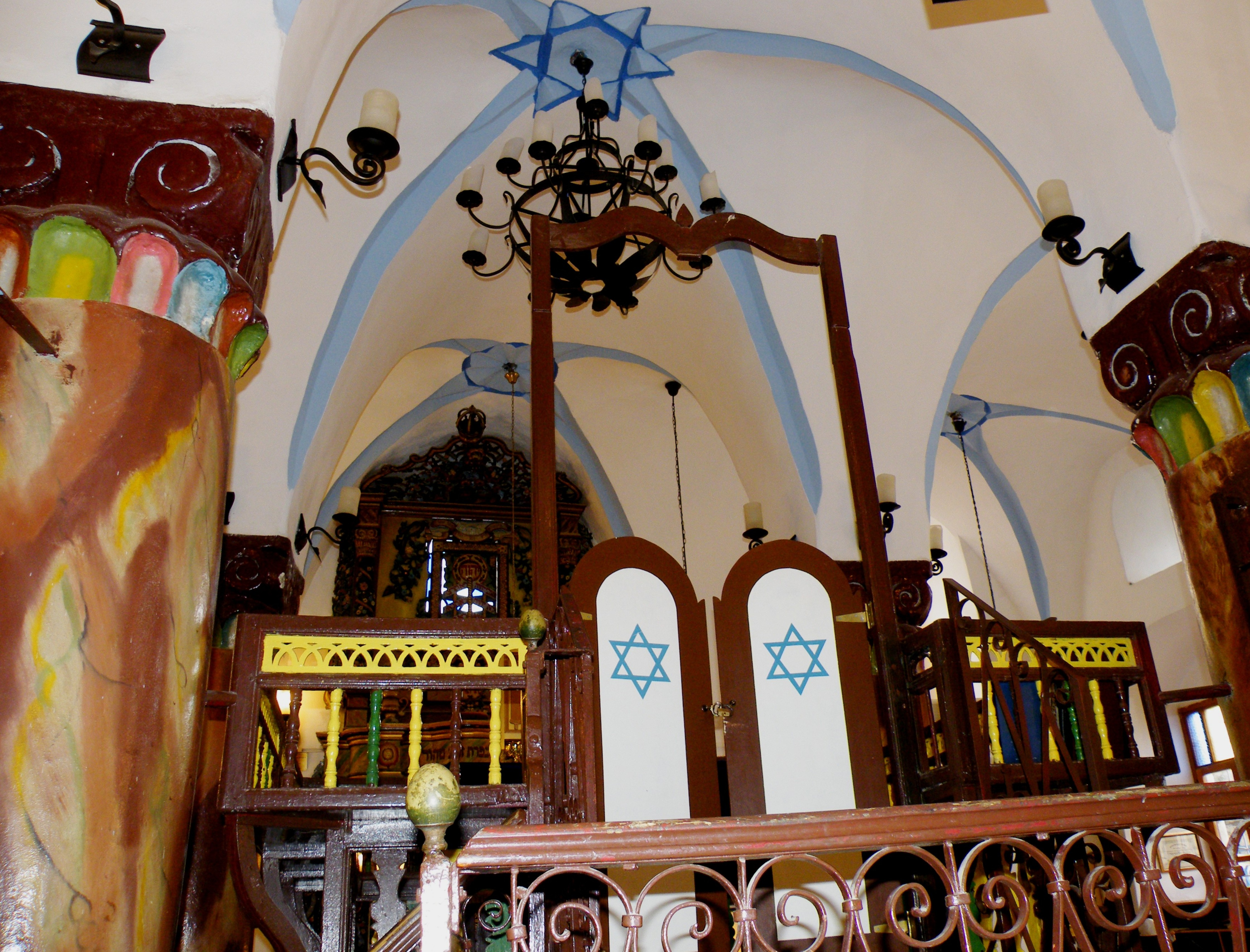 Ari Ashkenazi Synagogue, Safed.